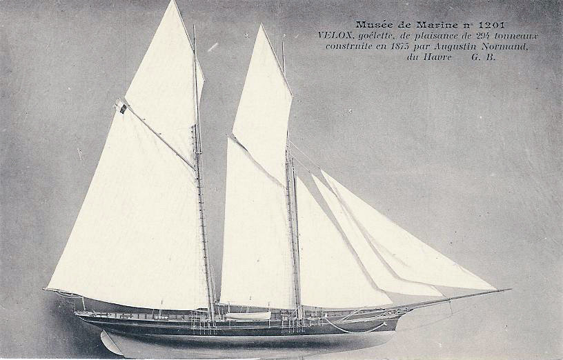 Goélette Velox (Modèle du Musée de la Marine)